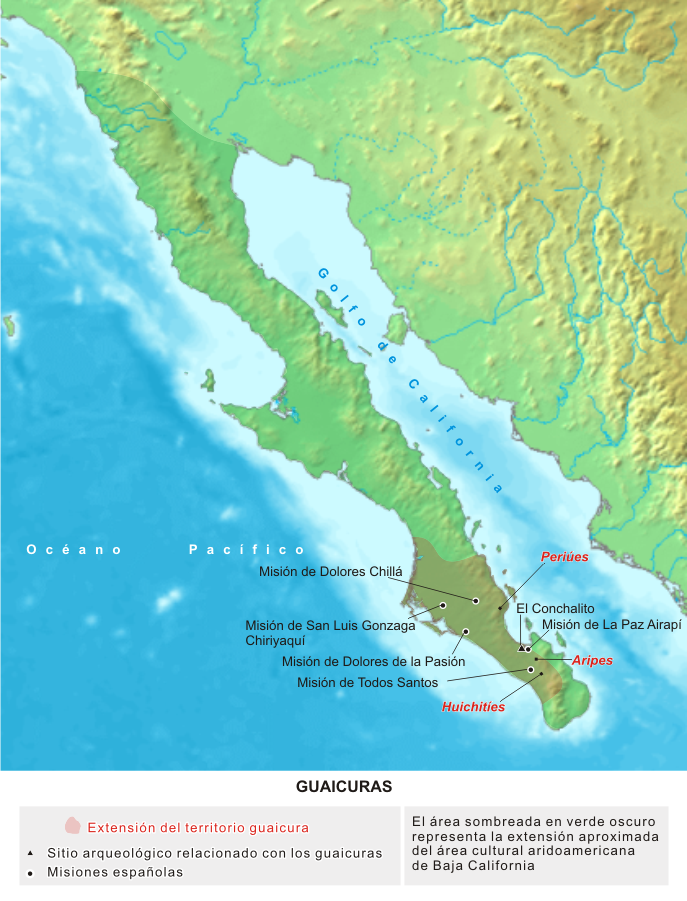 Mapa del territorio guaicura, en la península de California (México)